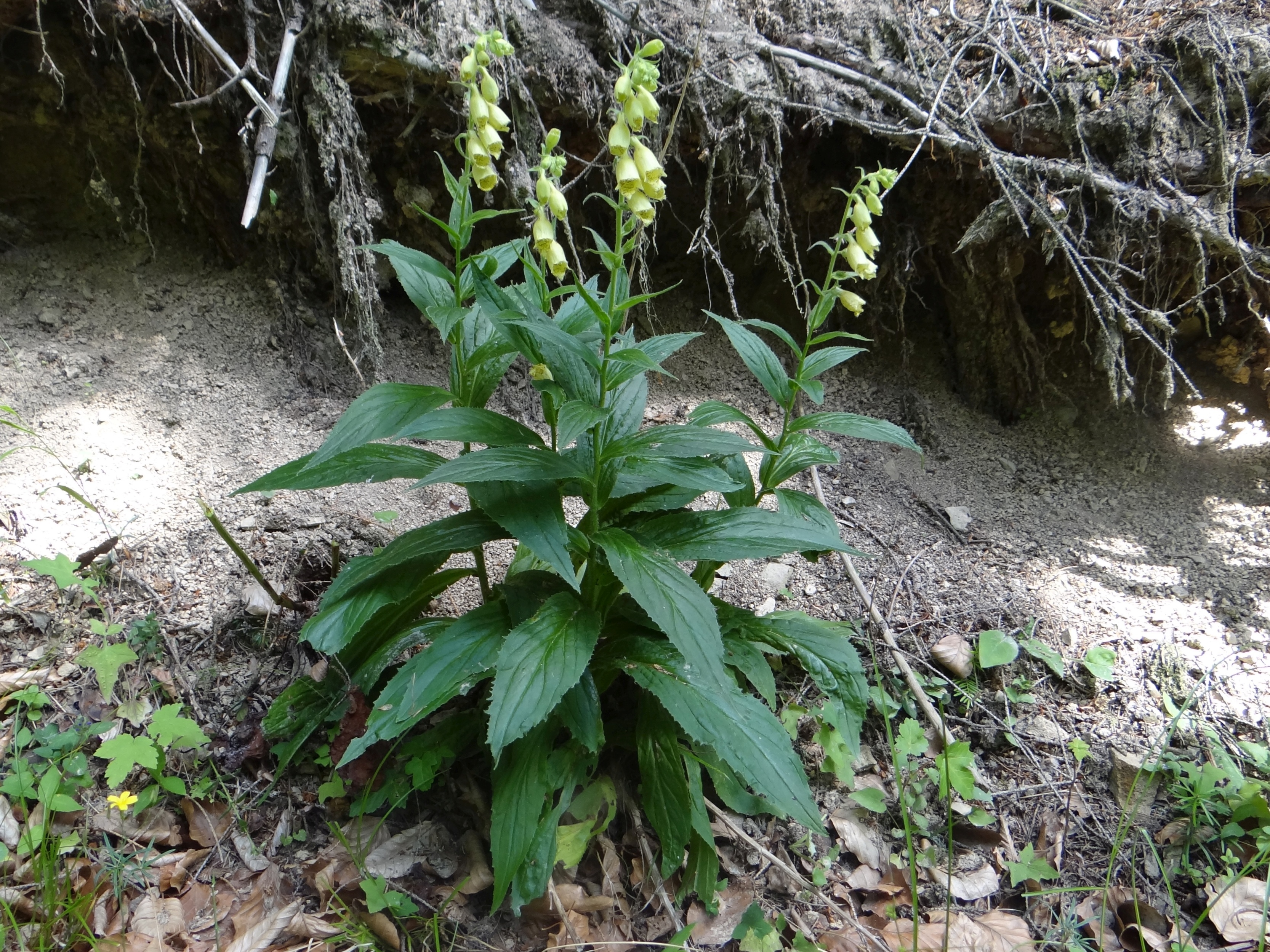 Digitalis grandiflora (loication: Slovakia, Magura Spiska, Sovia polana)